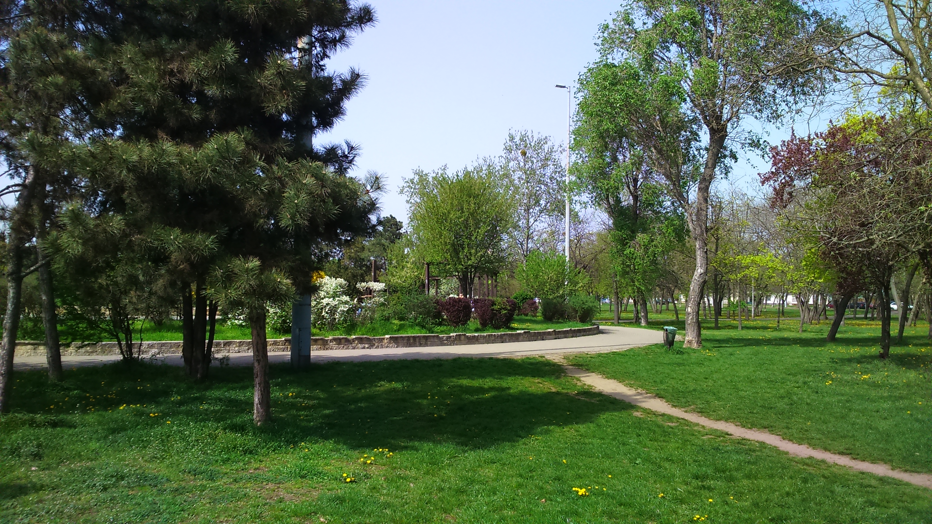 A X. kerületi Óhegy park központi területének egy részlete (Budapest-Kőbánya)